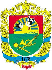 Герб г.Подгородное